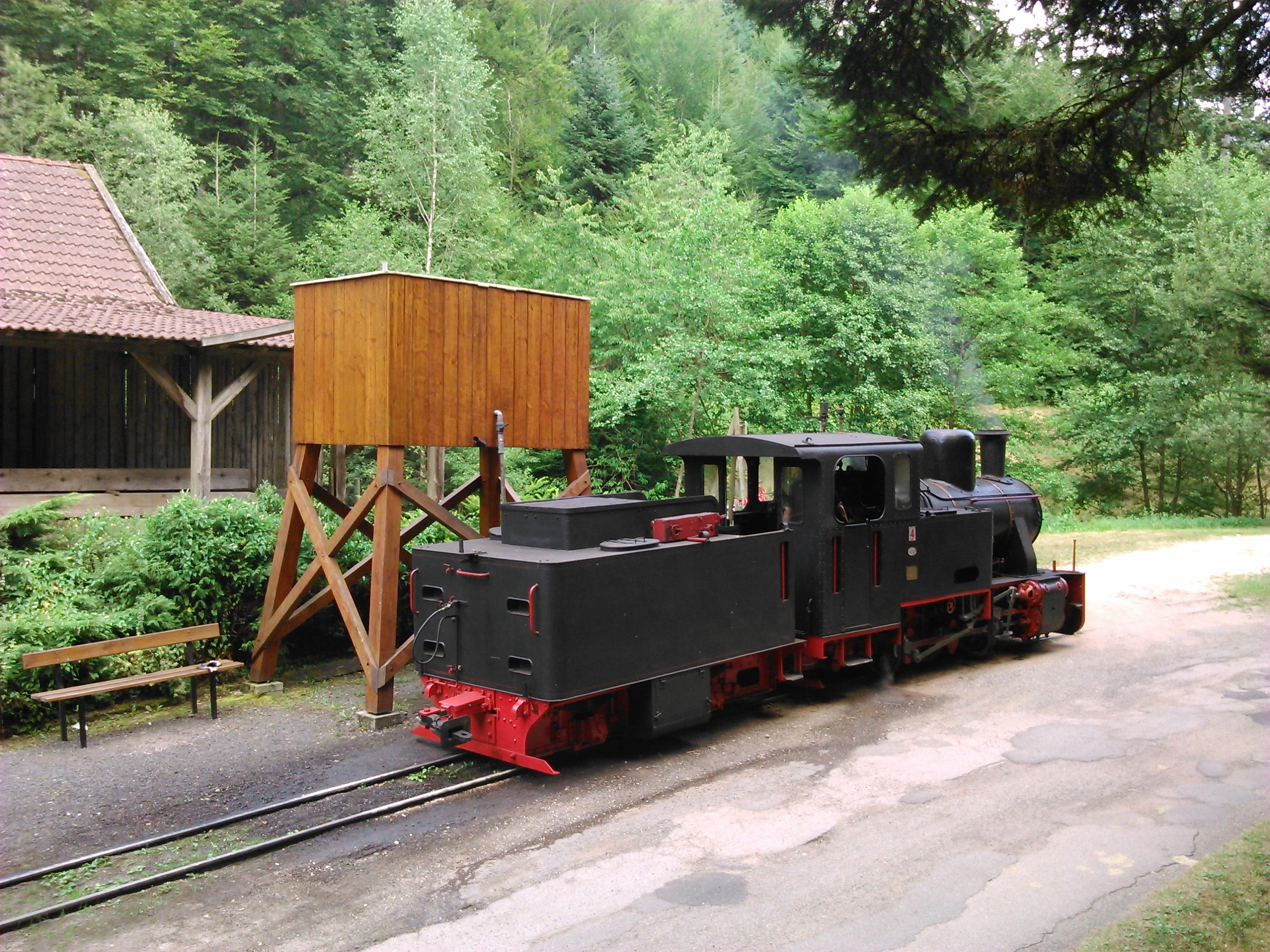 Chemin de fer forestier d'Abreschviller.